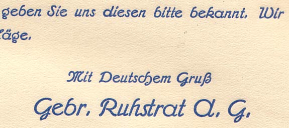 Infobrief, der mit "deutschem Gruß" unterschrieben ist. Datum: 07.10.1935